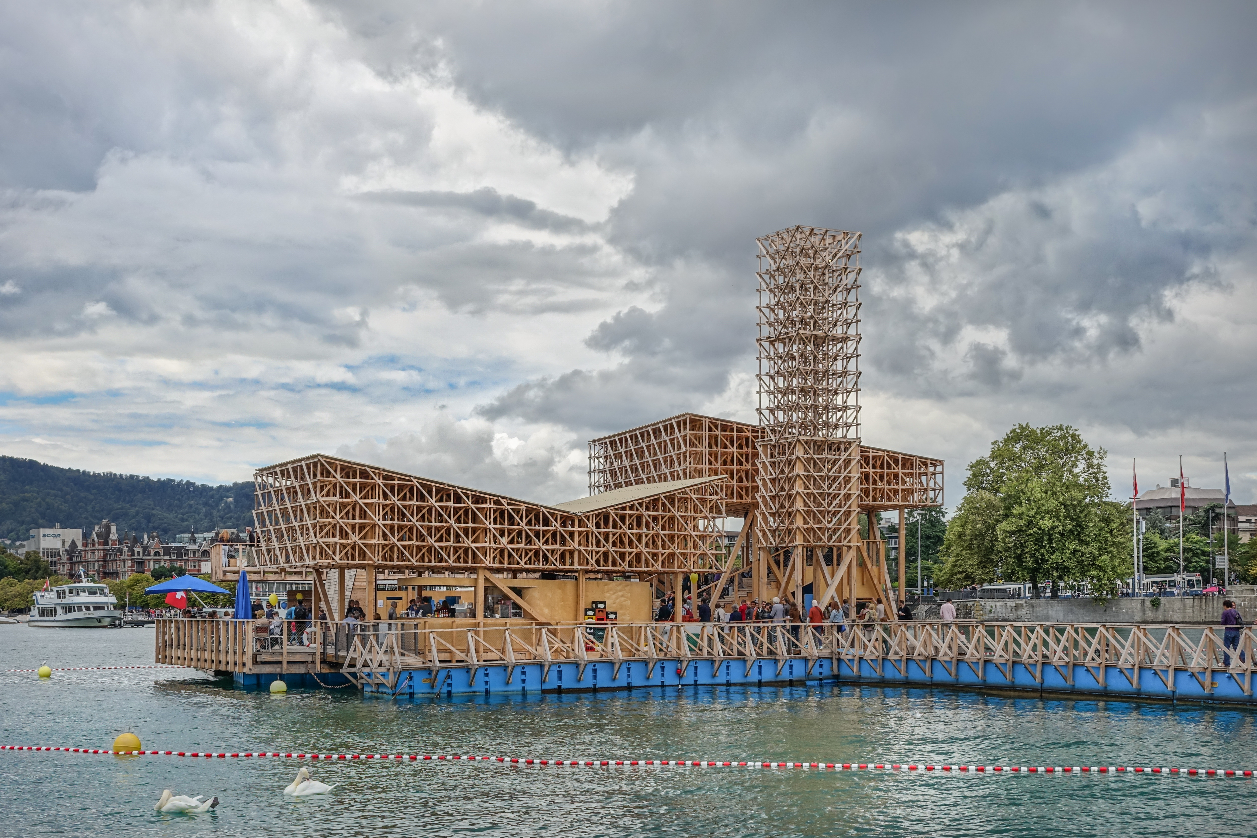 Pavillon of Reflections. Eine schwimmende Holzkonstruktion im Zürichsee beim Bellevue anlässlich der 11. Ausgabe der Manifesta, eine Biennale für zeitgenössische Kunst.